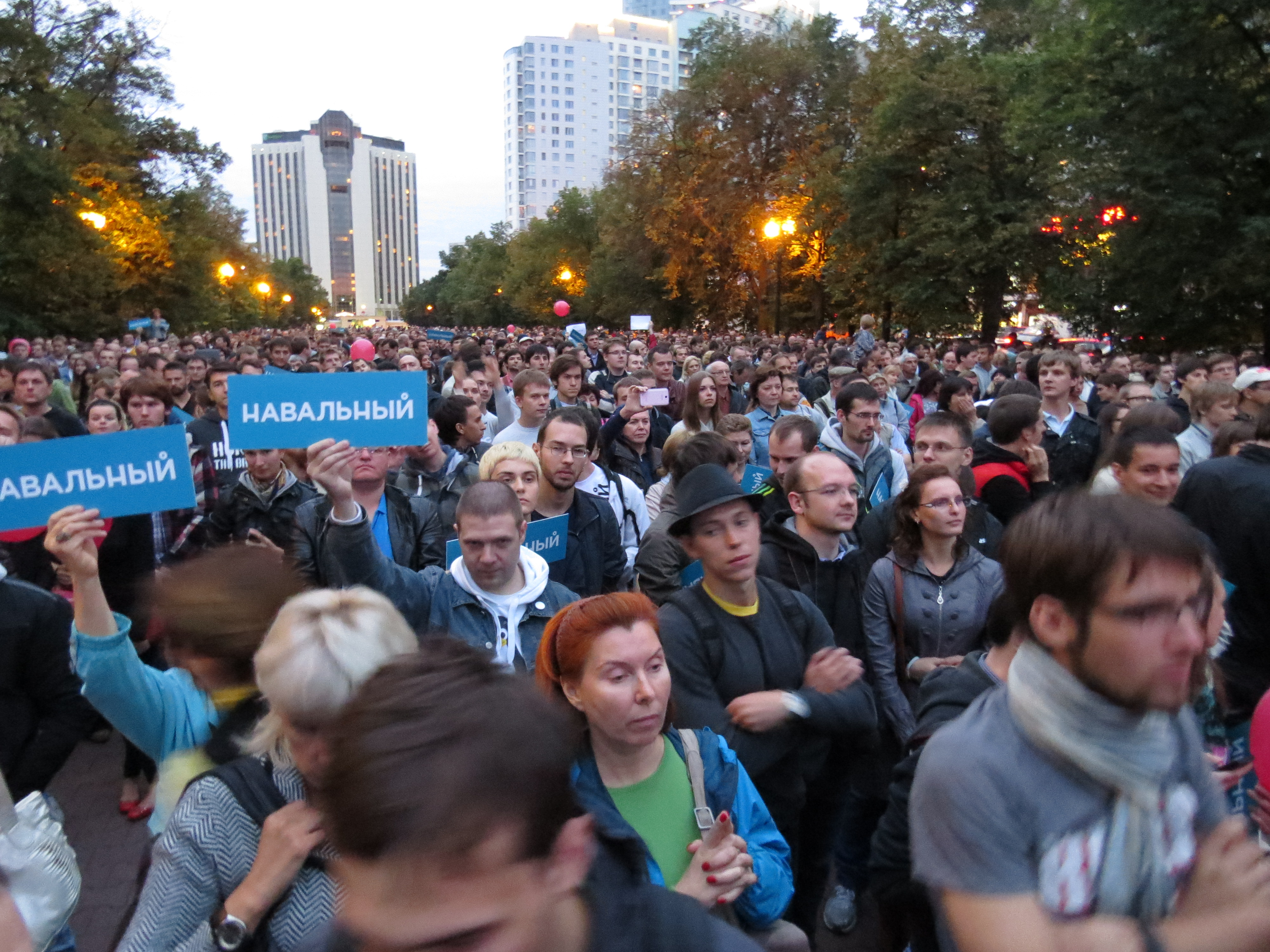 Встреча Алексея Навального с избирателями в Сокольниках 25 августа 2013 года